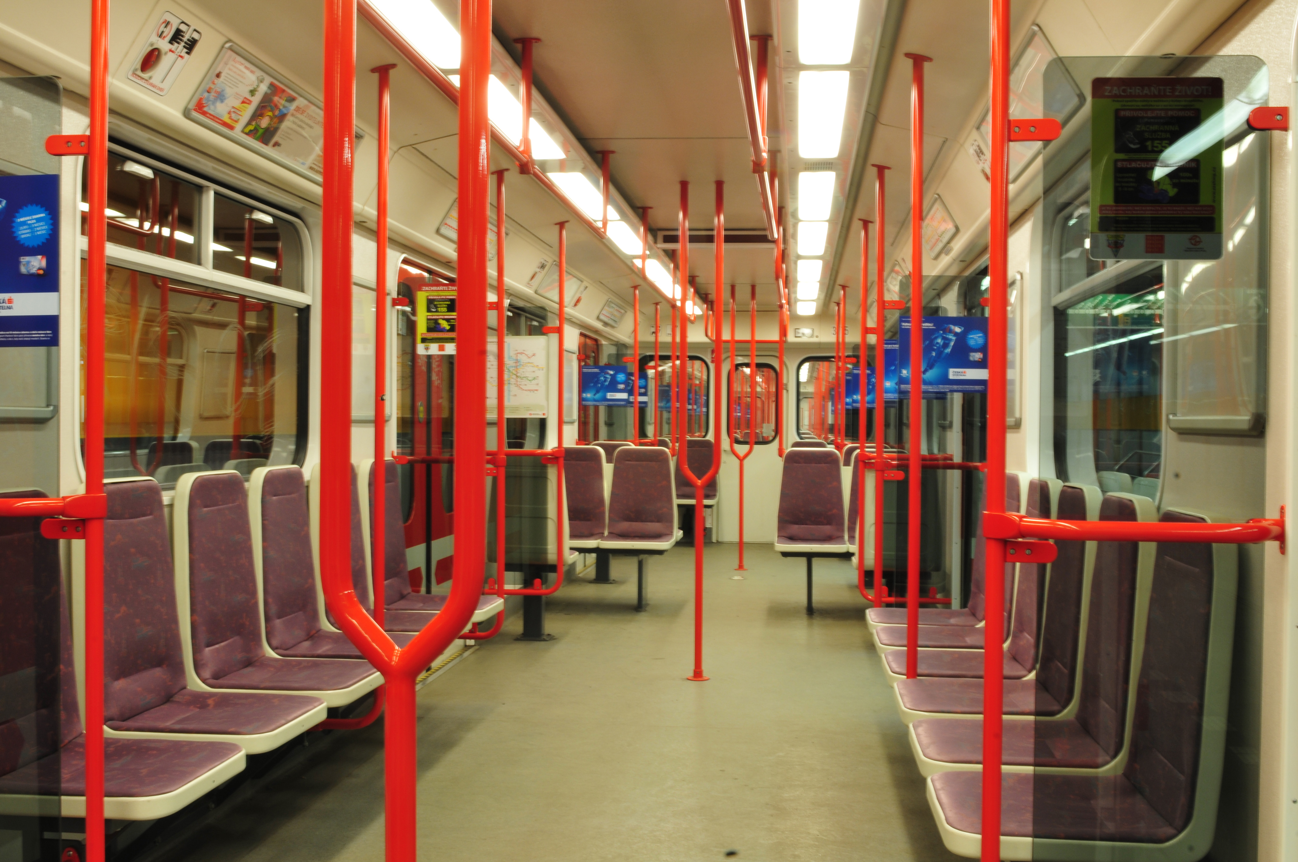 Metro Praha